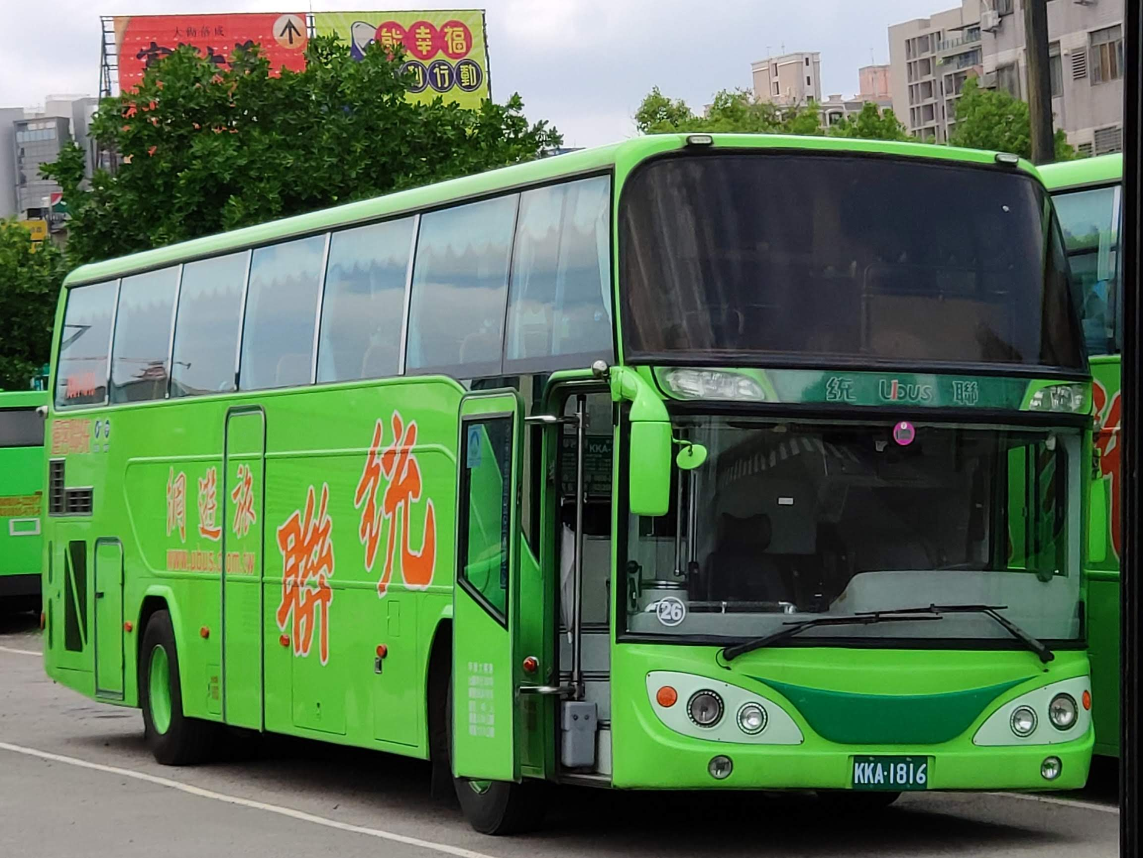 統聯客運三菱扶桑RP51JP3L大客車KKA-1816。